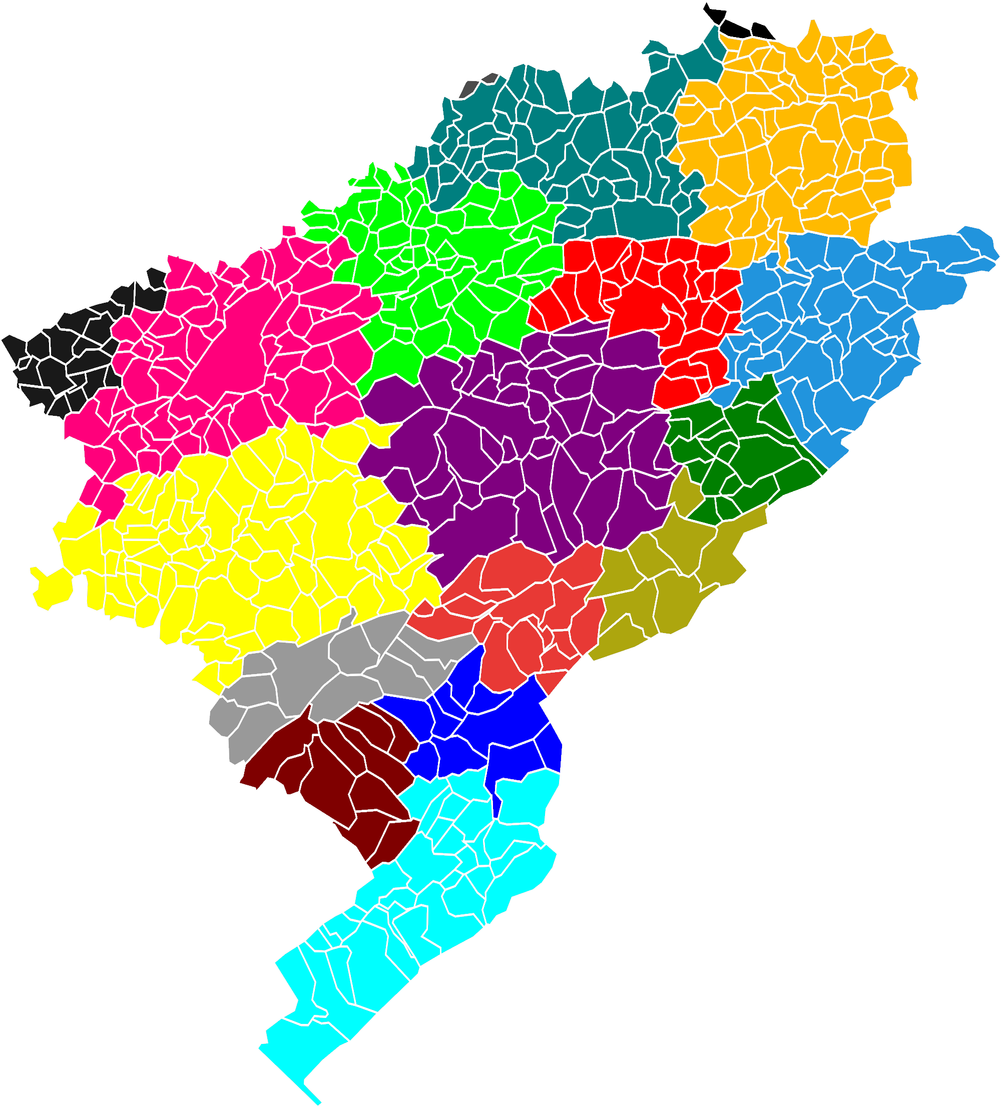 Carte des EPCI du département du Doubs au 1er janvier 2017 d'après le fond de carte Blank Map of Doubs Department, France, with Communes.svg